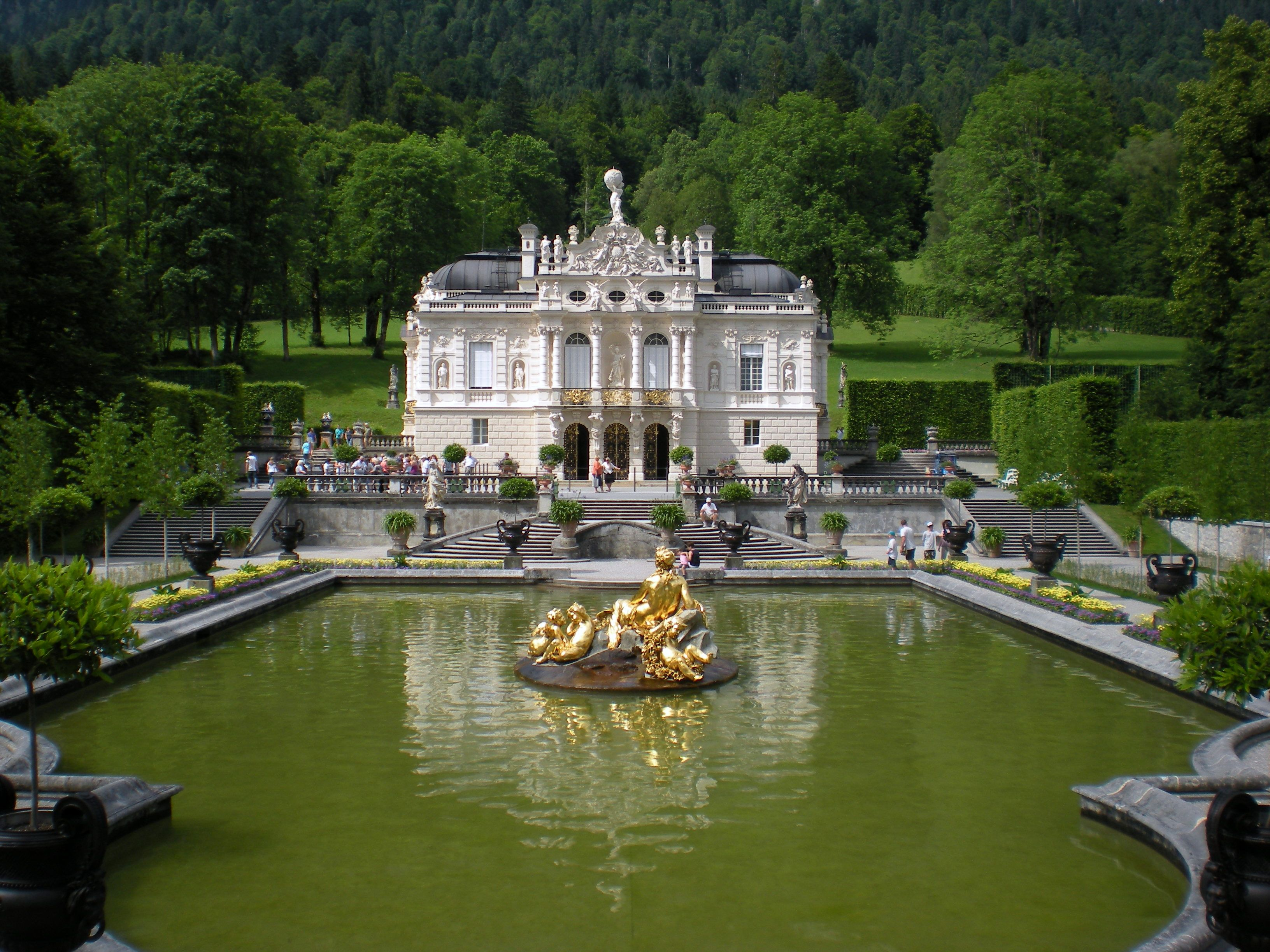 Linderhof es el más pequeño de los castillos mandados construir por Luis II de Baviera.